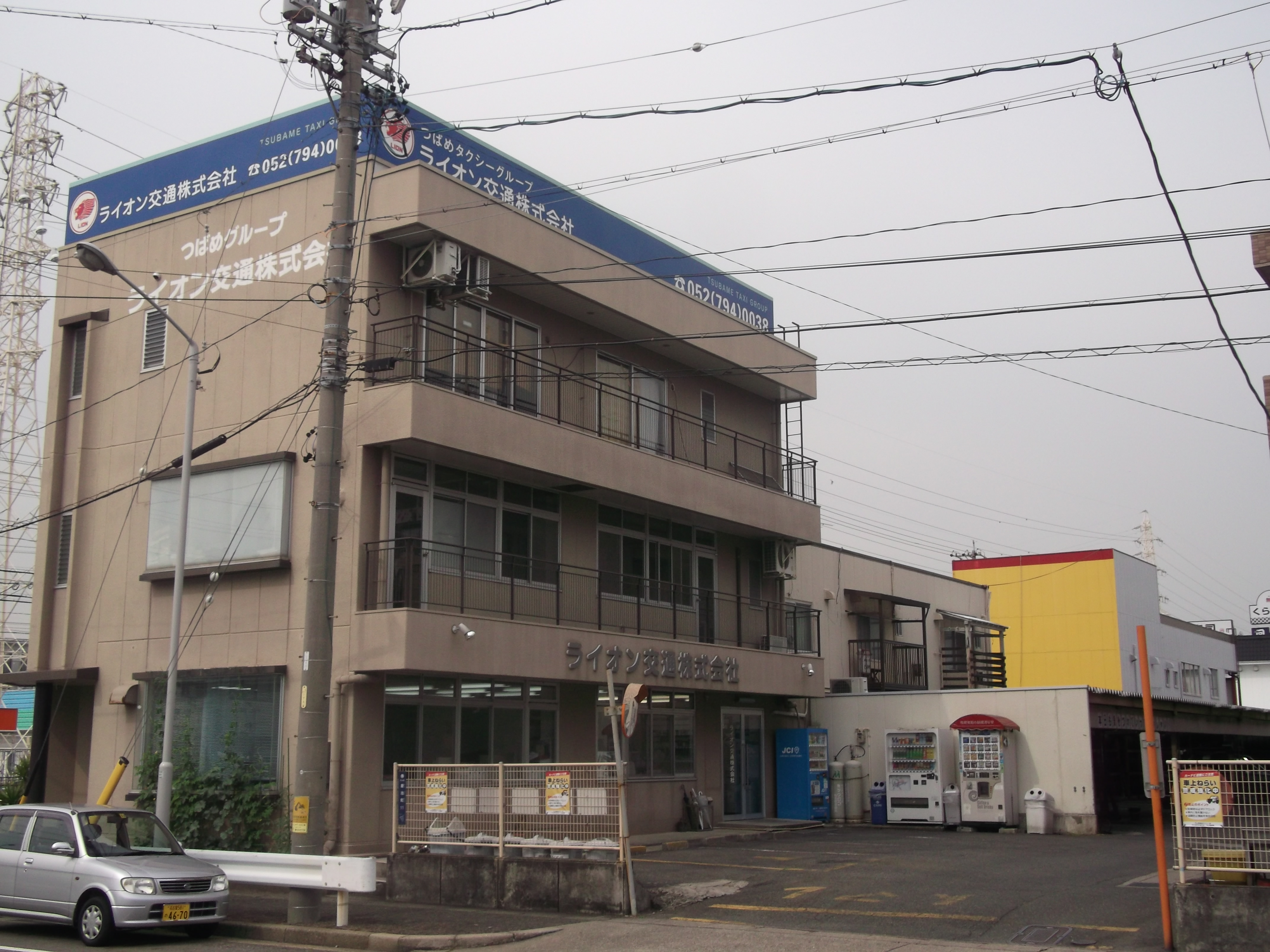 名古屋市守山区菱池町のライオン交通本社を西側公道から撮影